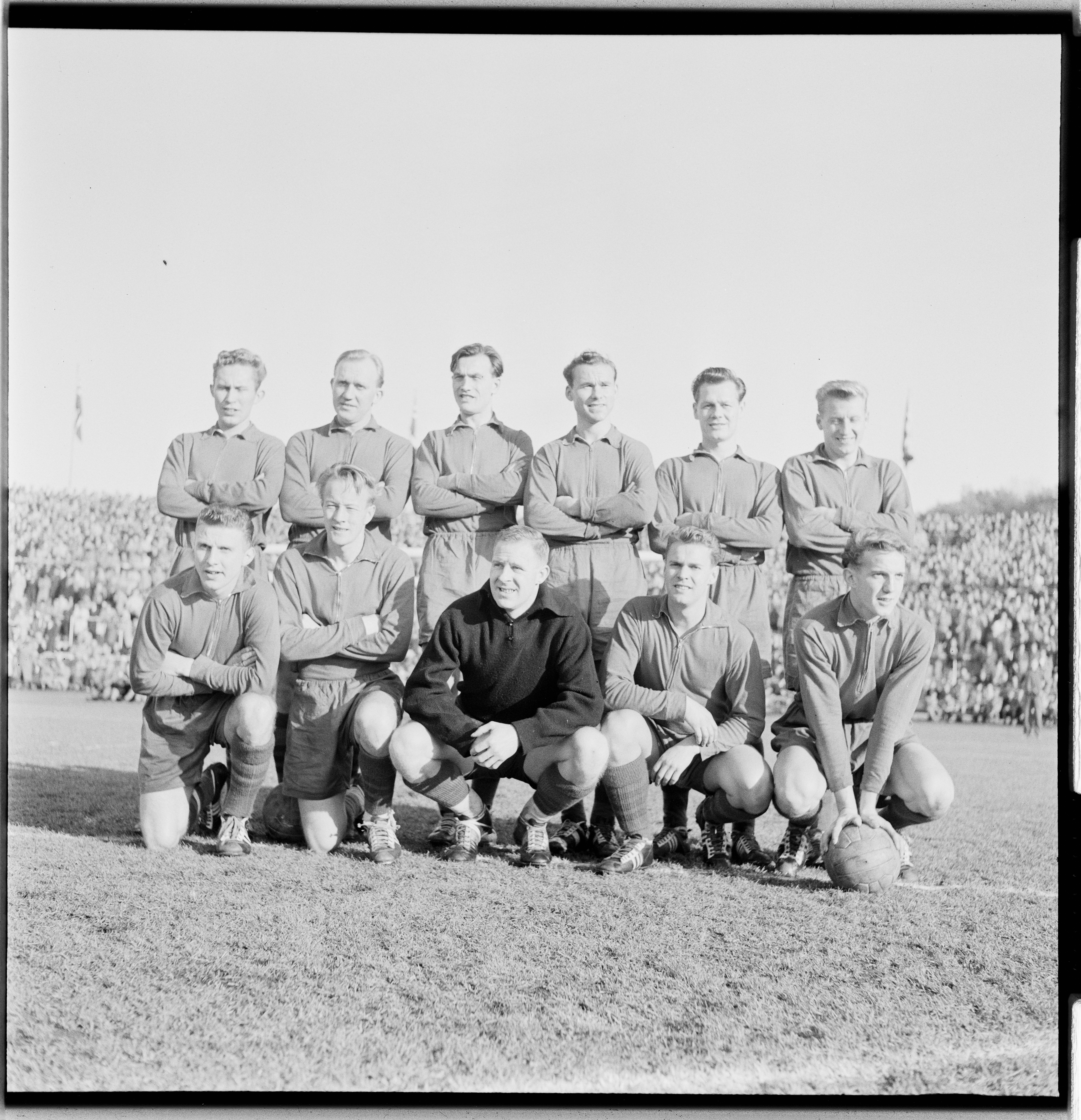 Bildet er hentet fra Arkivverket. Cupfinale Ullevål, Skeid-Lillestrøm Arkivinstitusjon : Riksarkivet Arkivnavn : Billedbladet NÅ Sted : Norge, Oslo, Oslo, Ullevål stadion Emneord: fotball, fotballkamp, cupfinale, pauseunderholdning Avbildet: Skeids vinnerlag: Øivind Johannessen, Arne Winther, Knut Gudem, Jan Gulbrandsen, Leif Belgen, Finn Gundersen, Jan Erik Wold, Hans Nordahl, Harald Hennum, Bernhard Johansen og Jack Farem. Norgesmesterskapet i fotball for menn 1955 ble vunnet av Skeid etter finaleseier 5–0 over Lillestrøm på Ullevaal Stadion 23. oktober. Dommer var Henry Klausen, Sarpsborg.